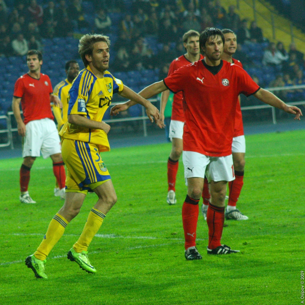 Марко Девич